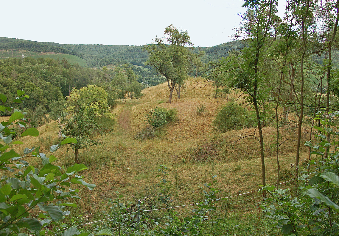 Burgstall der Burg Bromberg mit doppeltem Halsgraben (von Süden/Bergseite)